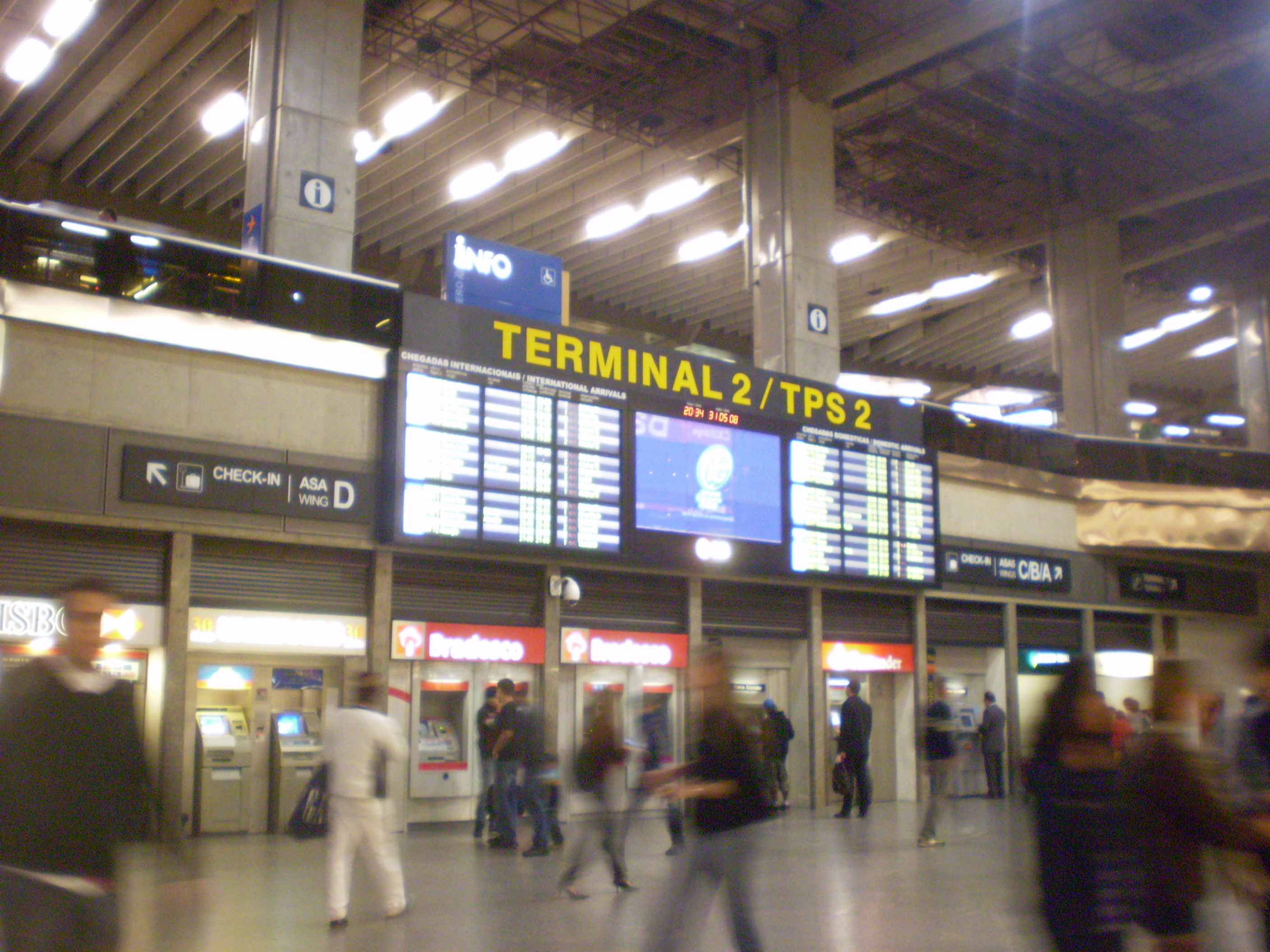 Terminal 2 de GRU